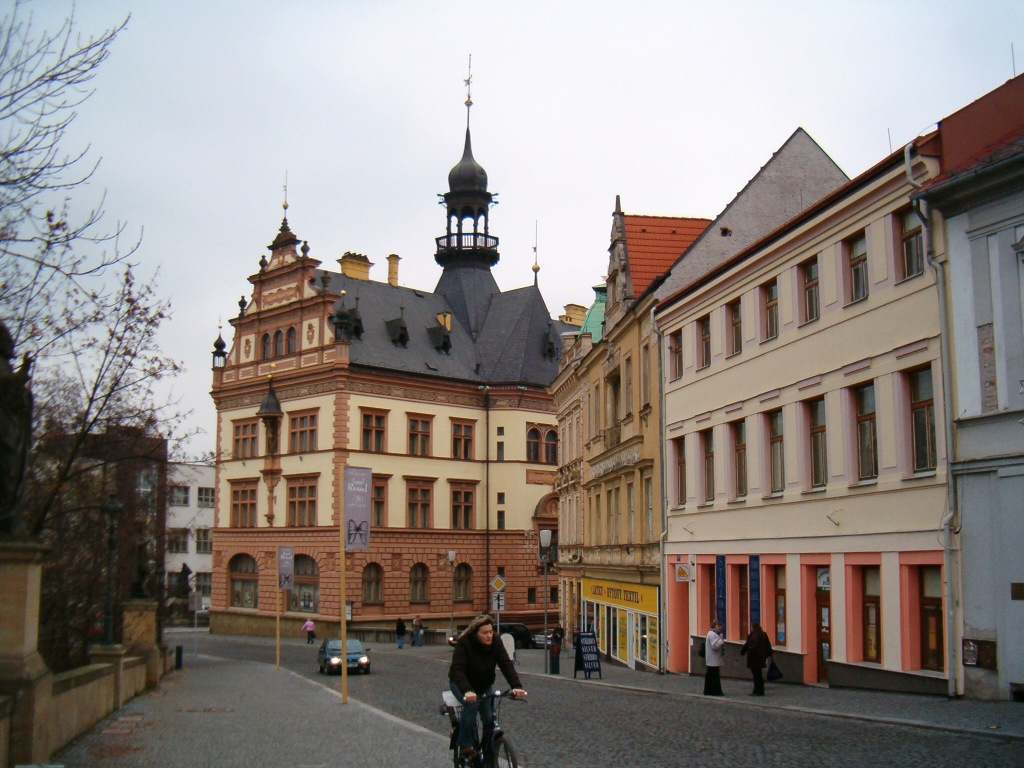 Chrudim - muzeum